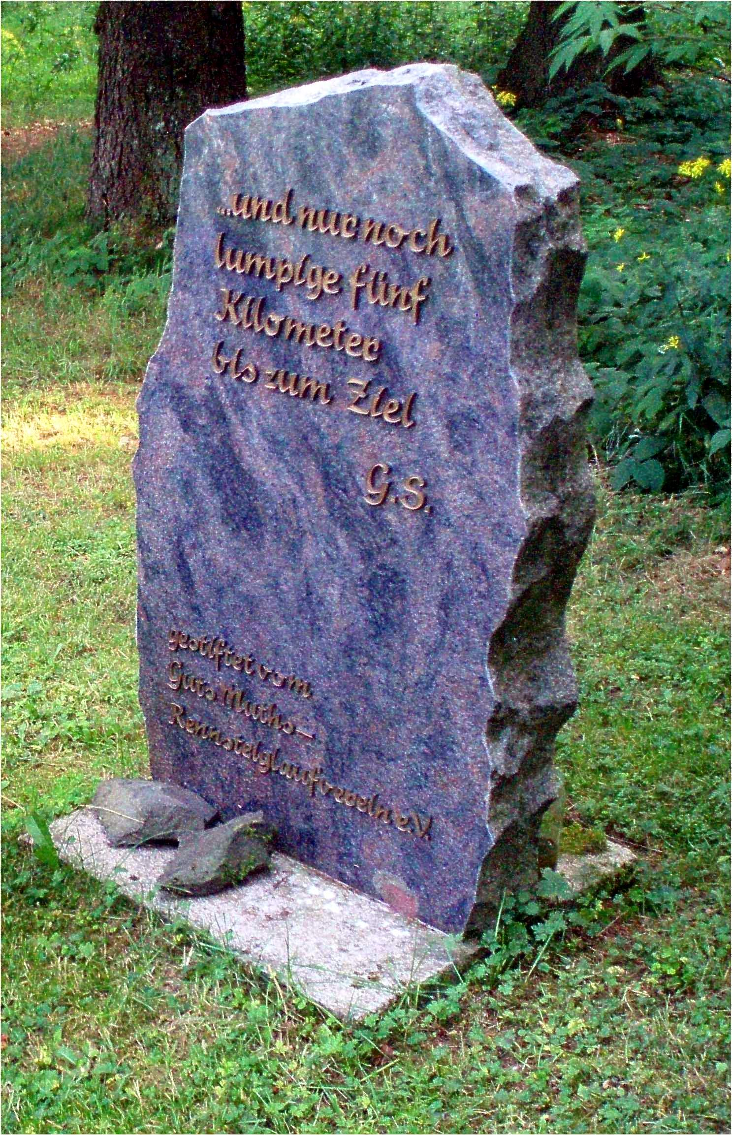 Denkmal für den Rennsteiglauf